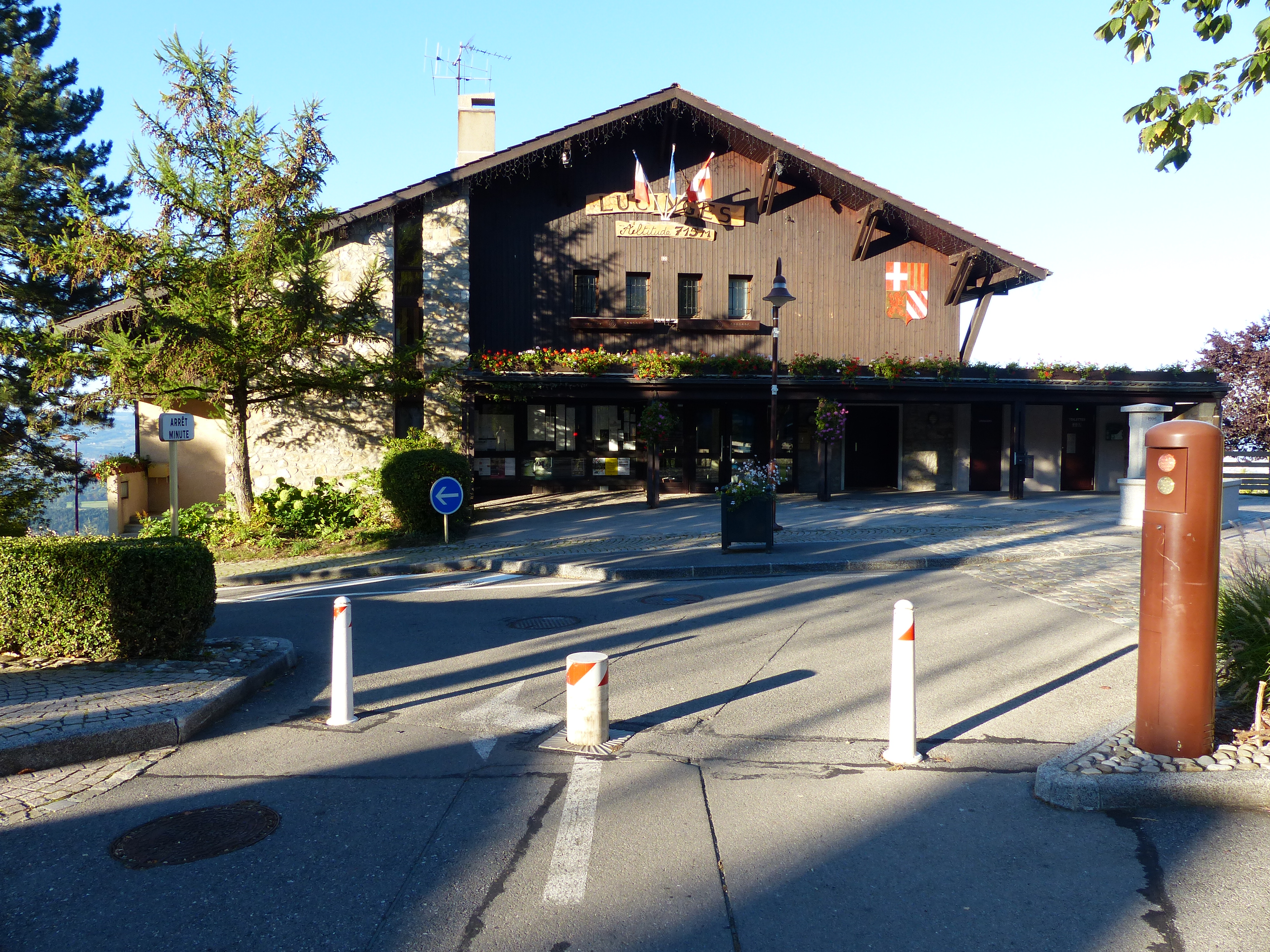 La mairie de Lucinges, Haute-Savoie, France.